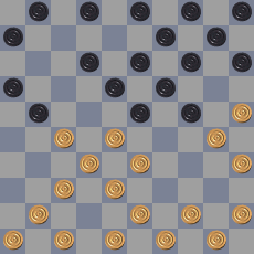 Zelfgemaakt diagrammetje